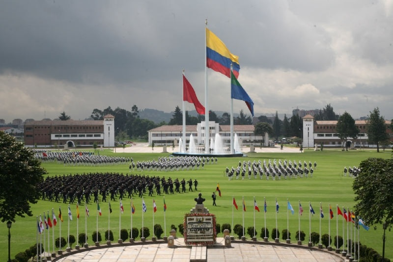 Escuela Militar de Cadetes General José María Cordova, Bogotá (Colombia)